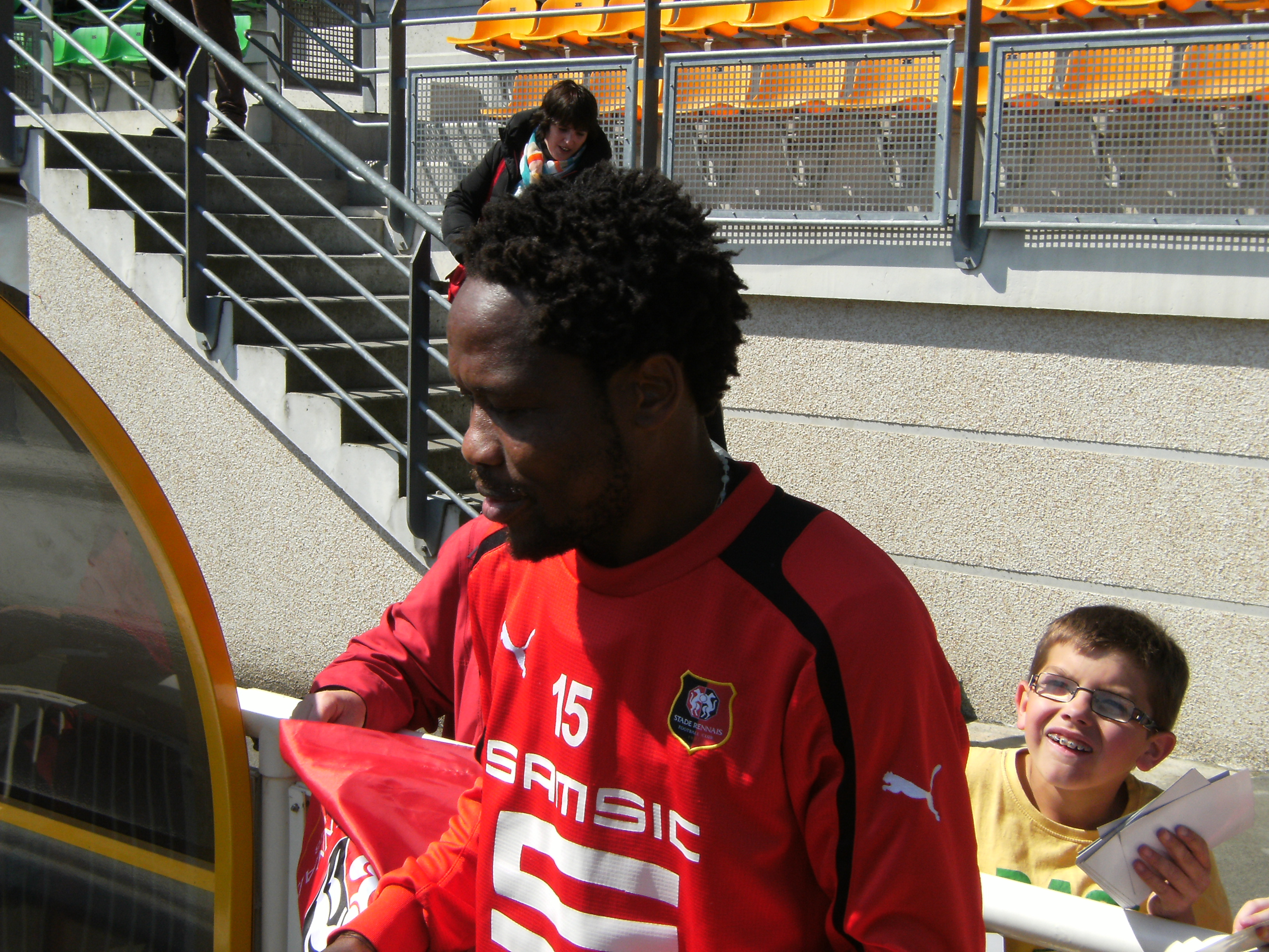 Photo prise lors d'un entraînement du Stade rennais au stade de Marville de Saint-Malo le 3 mai 2013. Ici, Jean II Makoun.